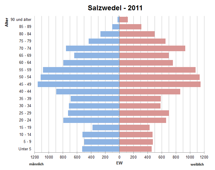 Bevölkerungspyramide der Stadt Salzwedel nach Zensus 2011.